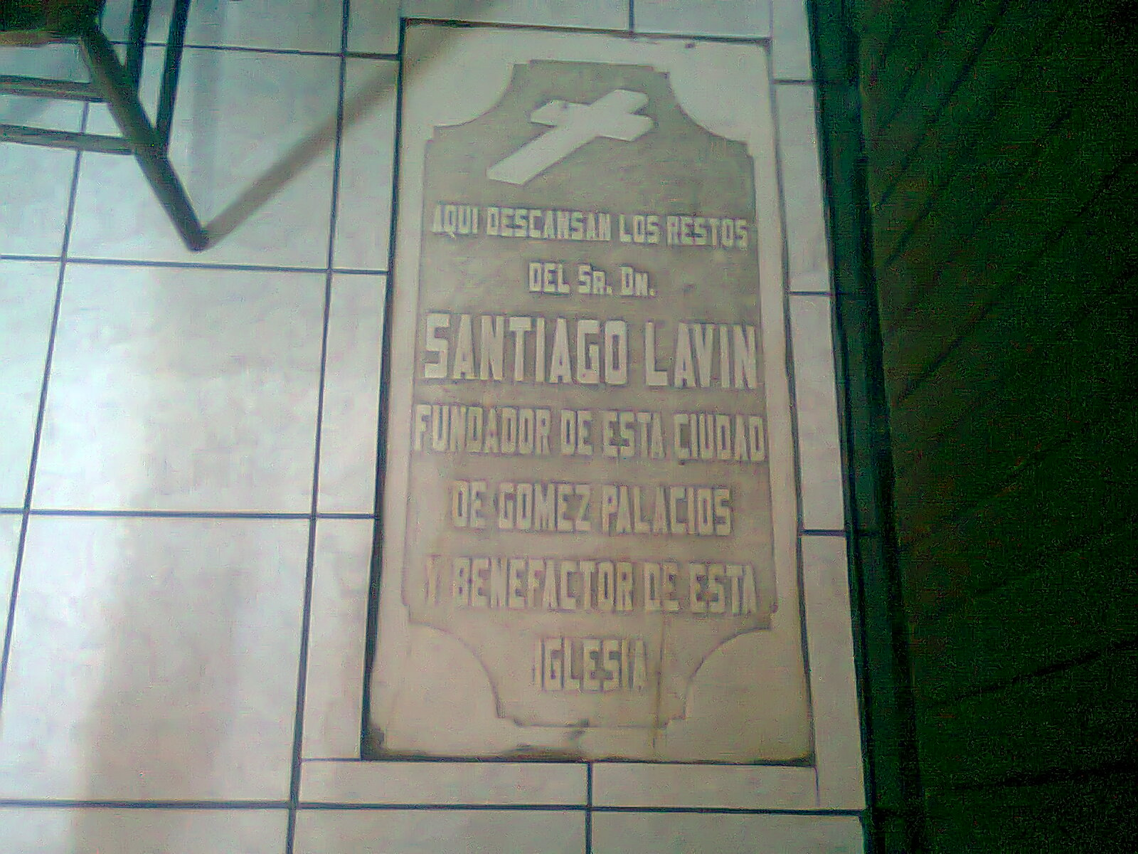 fundador de gomez palacio